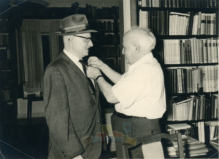 ראש הממשלה דוד בן גוריון עונד למשה פראגר את אות ההגנה בביתו ברחוב קרן קיימת בתל אביב